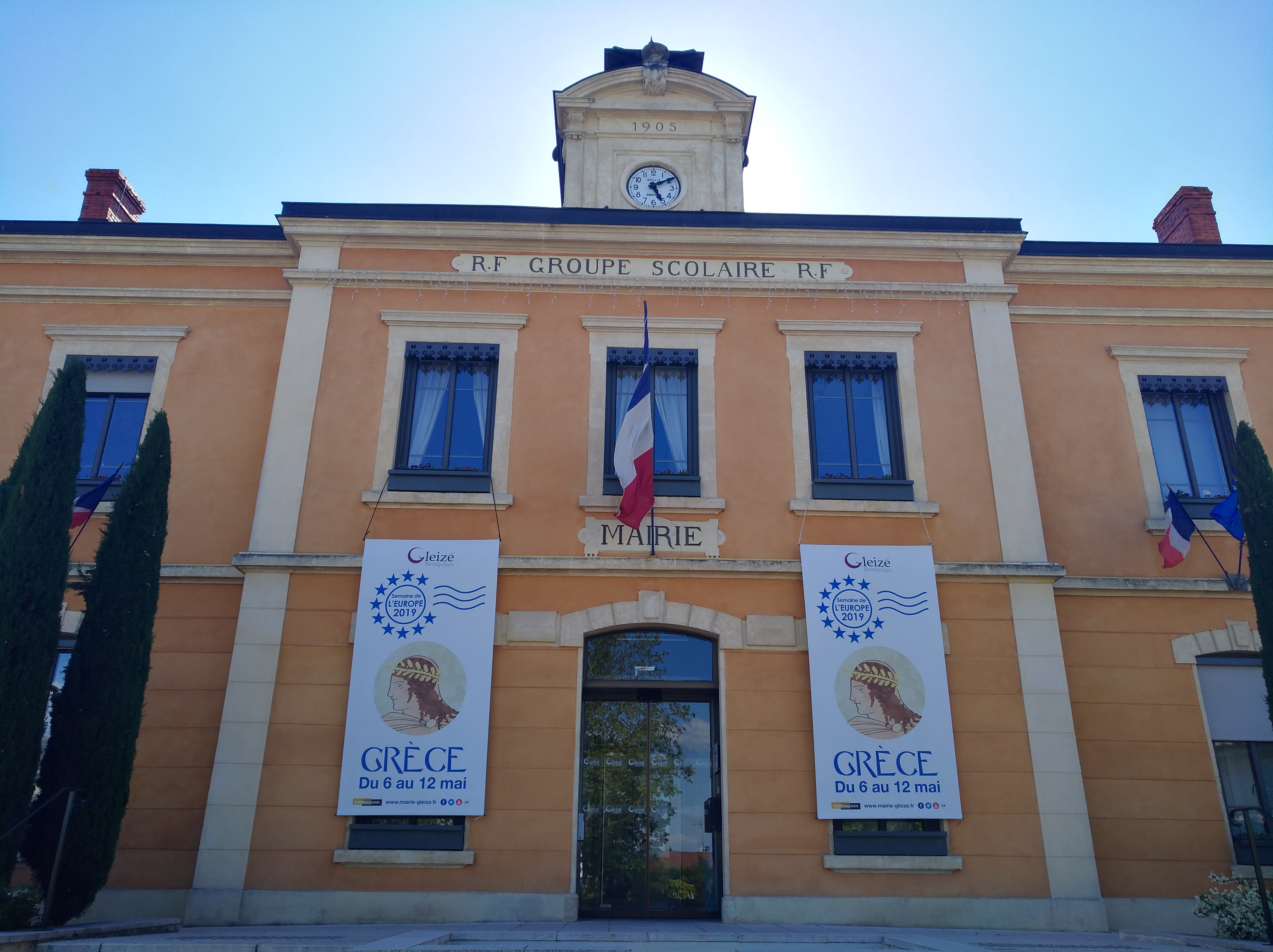 Mairie de Gleizé (Rhône, France).